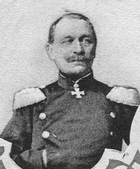 Kommandeur Ulanen-Regiment "Großherzog Friedrich von Baden" (Rheinisches) Nr. 7